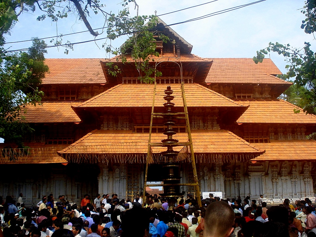 Vadakkumnathan Kshethram - ThrissurPooram Day